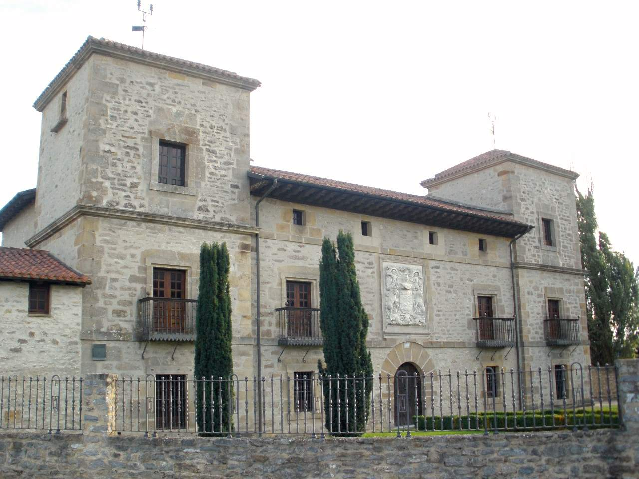 Palacio Zurbano, en Zurbano, ayto. de Arrazua-Ubarrundia, Álava